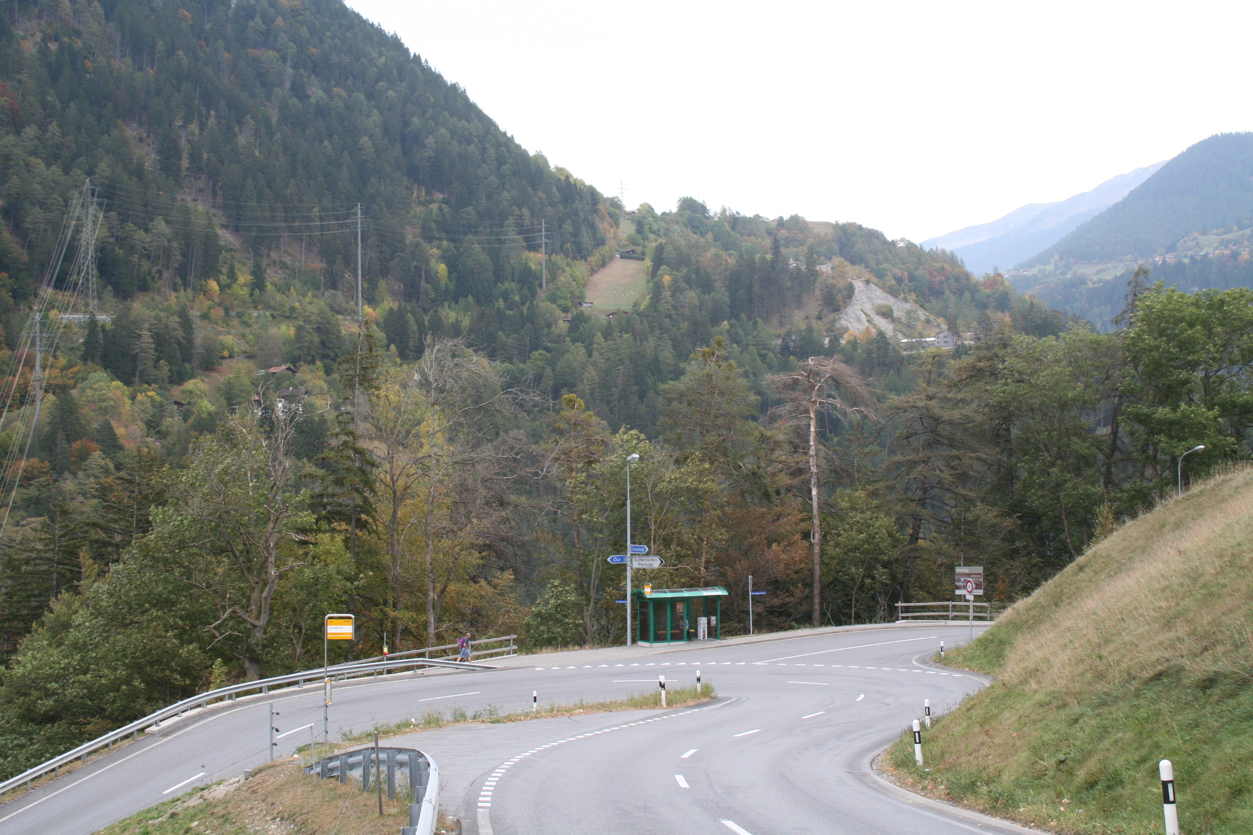 Araschgerrank oberhalb Chur